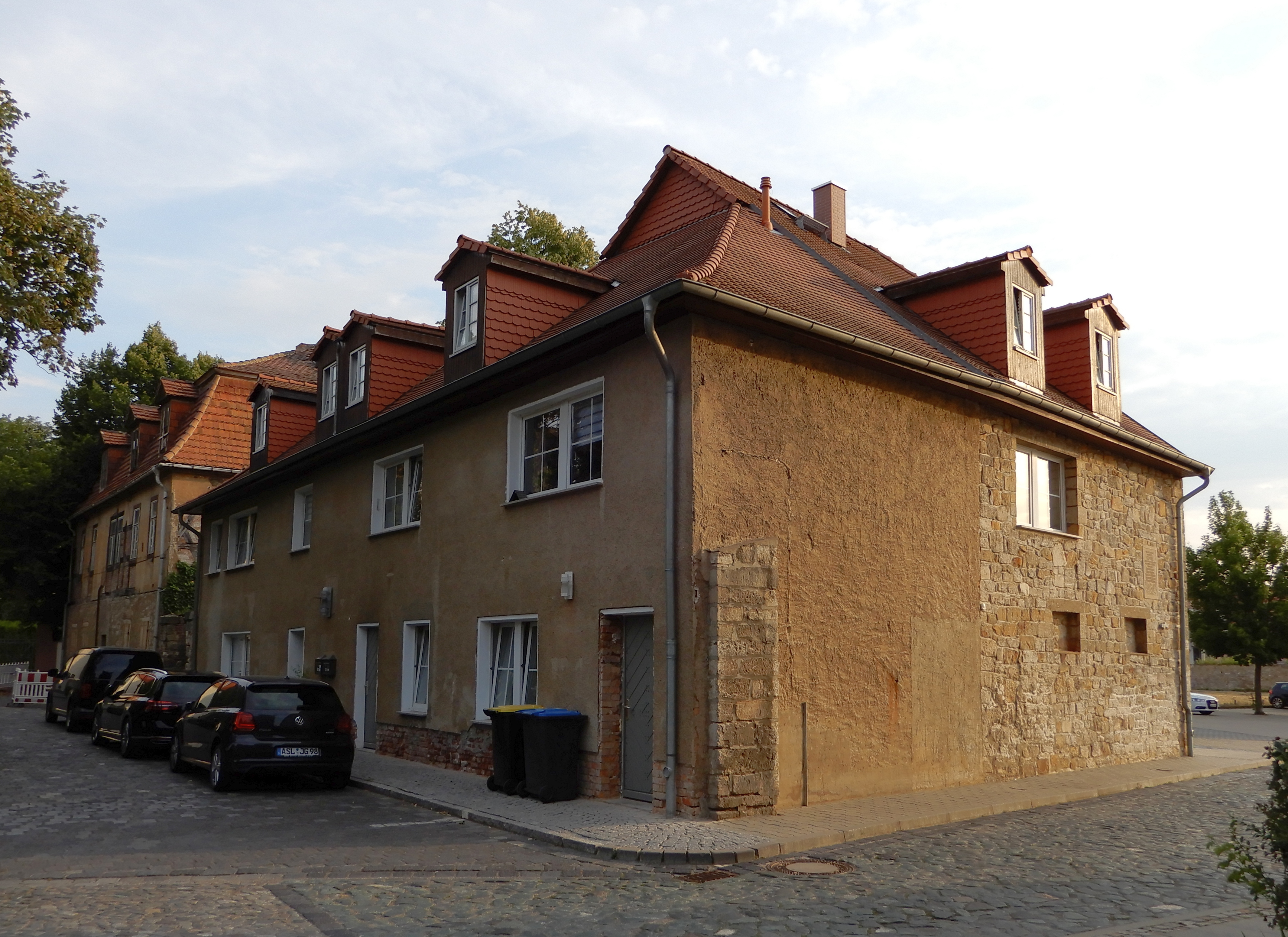 Häuser Schlossplatz 2 und 3